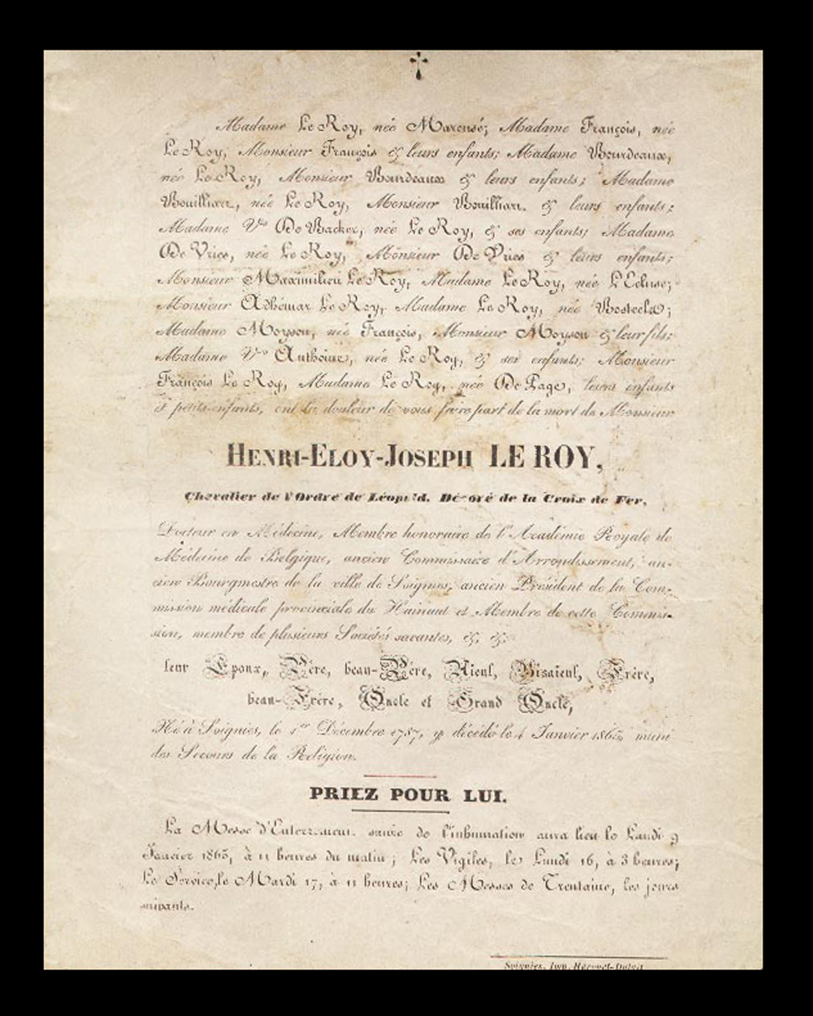 Faire part de décès d'Henry Eloi Leroy